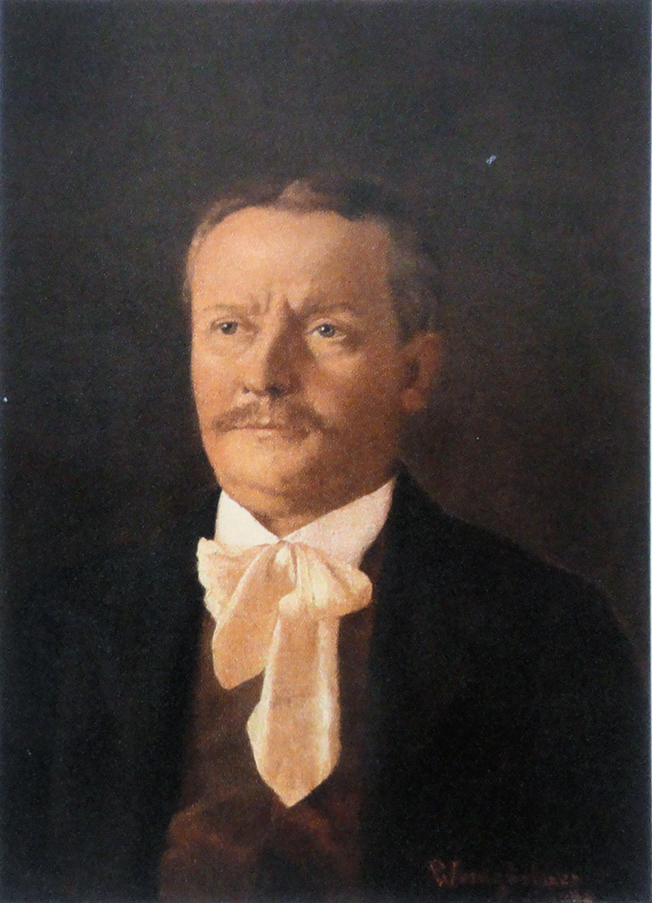 Retrato de Inácio Weingärtner_Junior, óleo sobre tela, 34 x 23 cm